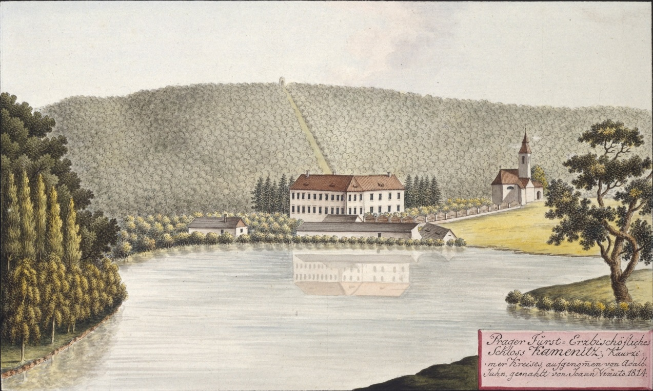 Kamenice (okres Praha-východ). Prager Fürst-Erzbischöfliches Schloss Kamenitz, Kauřzimer Kreises, aufgenommen von Adalb. Juhn, gemahlt von Joann Venuto 1814